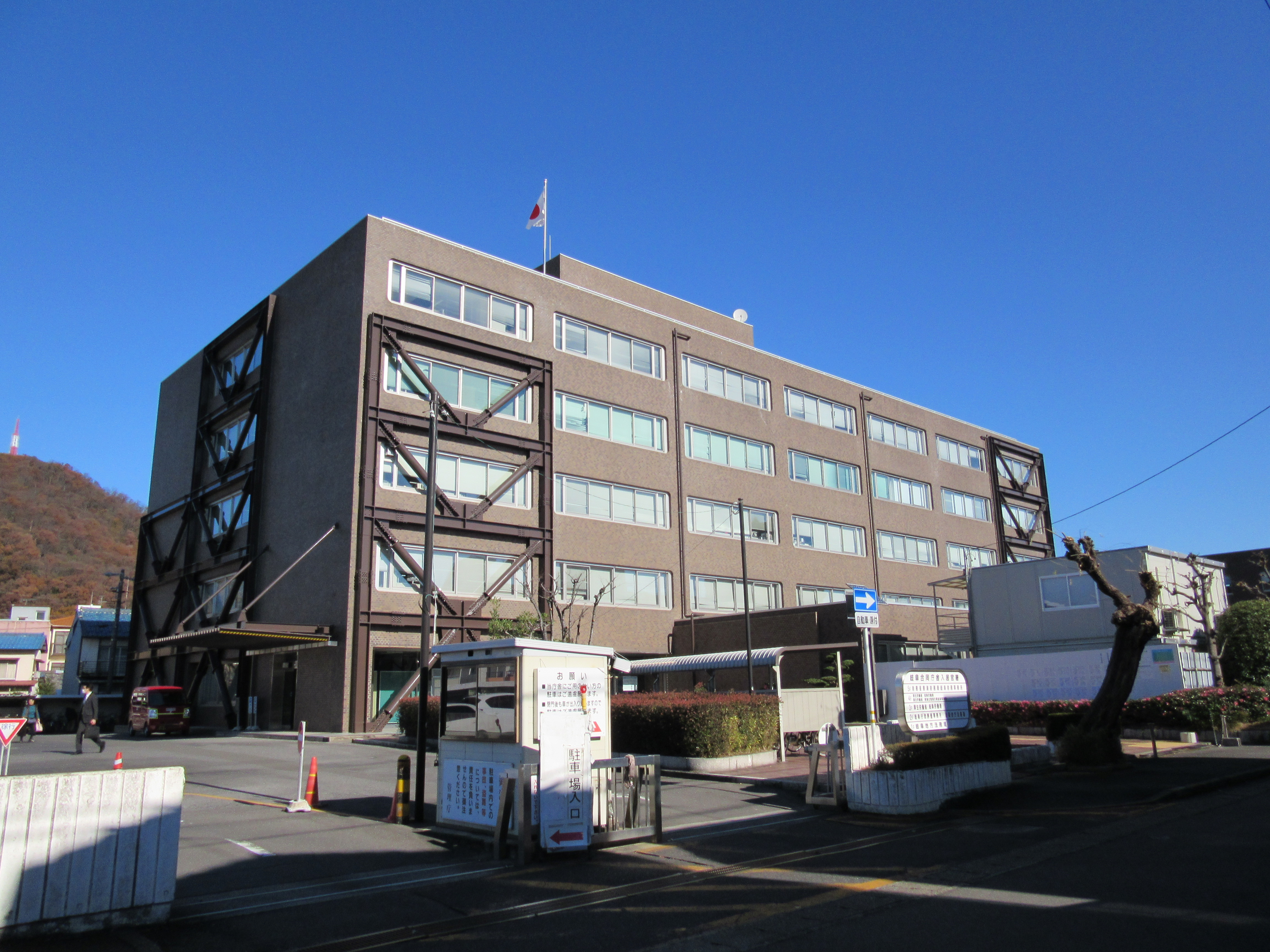 岐阜合同庁舎（岐阜行政評価事務所、岐阜地方法務局、東海北陸厚生局岐阜事務所、岐阜労働局金竜町庁舎）